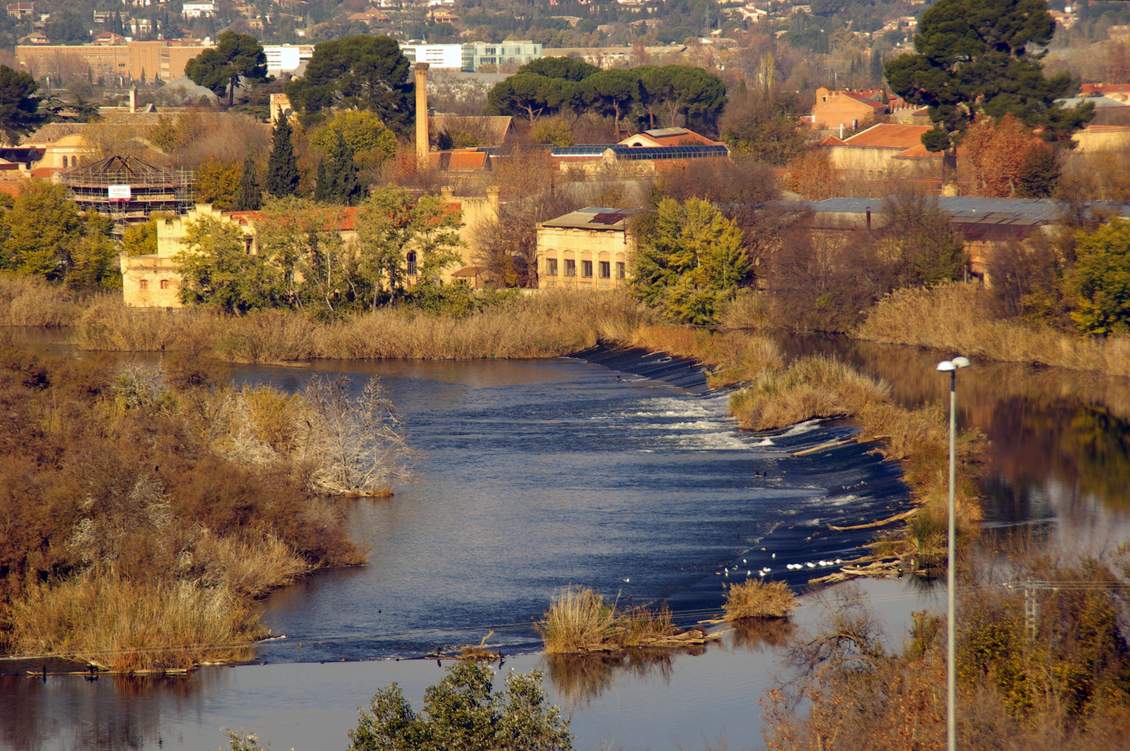 ® S.D. TOLEDO RIO TAJO_VEGA BAJA ◙